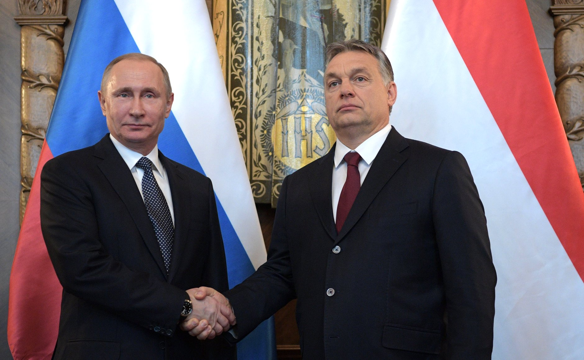 Президент России Владимир Путин и Премьер-министр Венгрии Виктор Орбан перед началом российско-венгерских переговоров